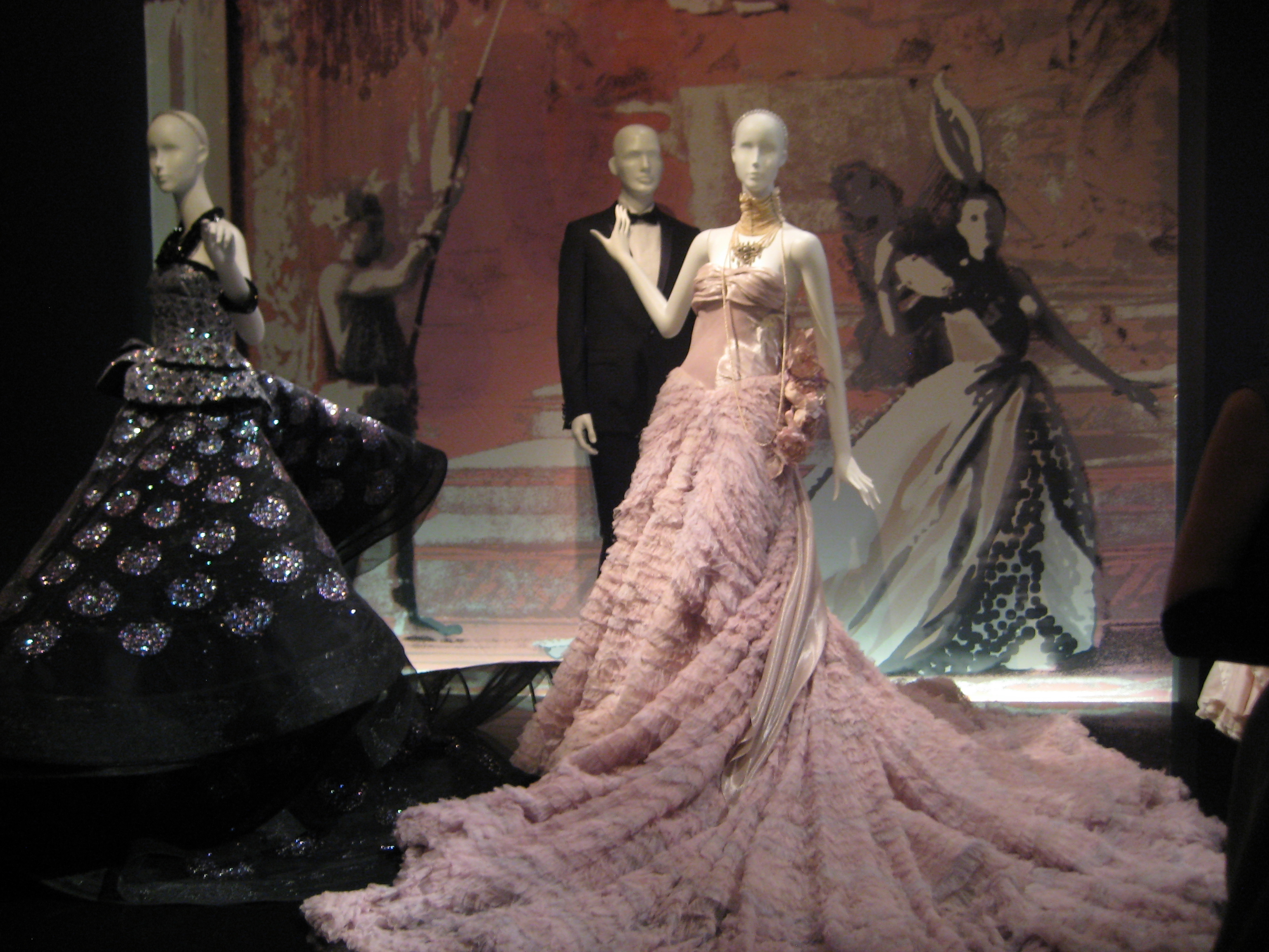 Выставка